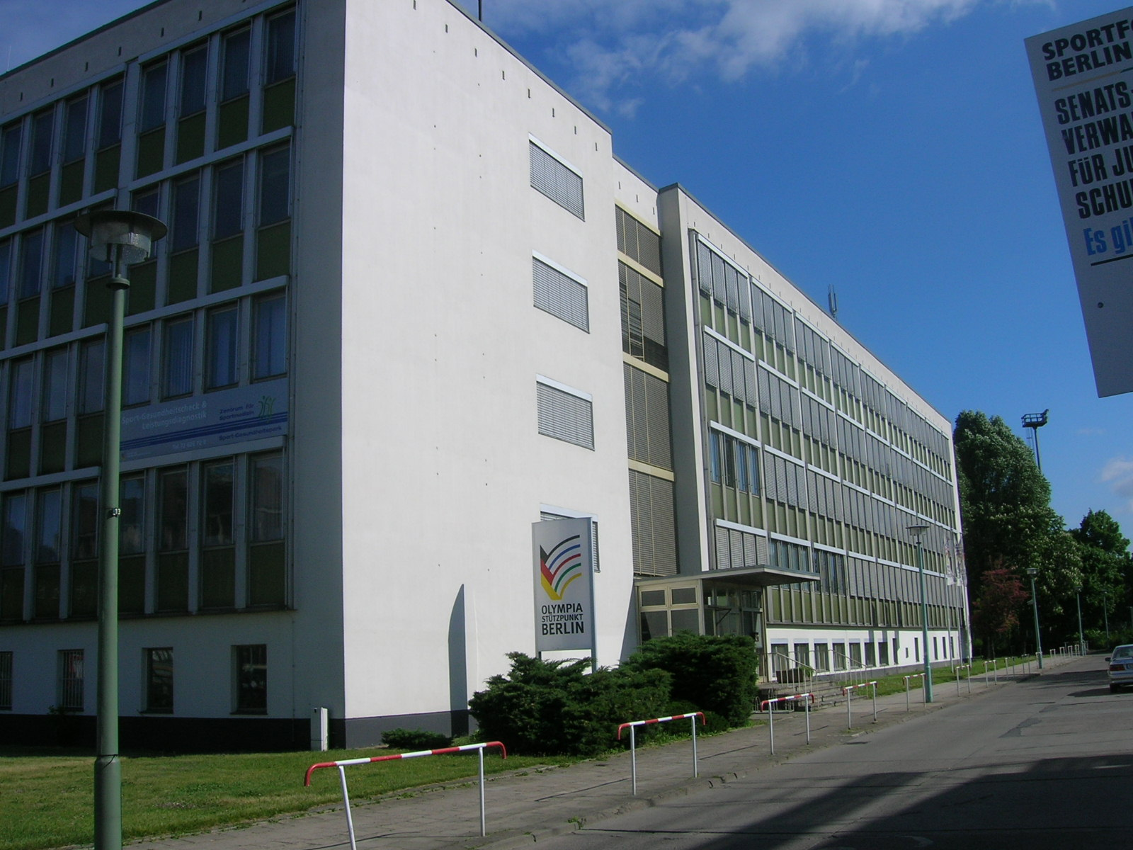 Sportforum Berlin in Berlin-Hohenschönhausen, Olympia-Stützpunkt